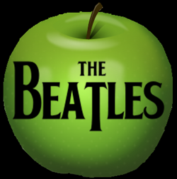 Fusion de ESTA File:Chrisdesign_Photorealistic_Green_Apple.svg y esta File:Beatles_logo.svg